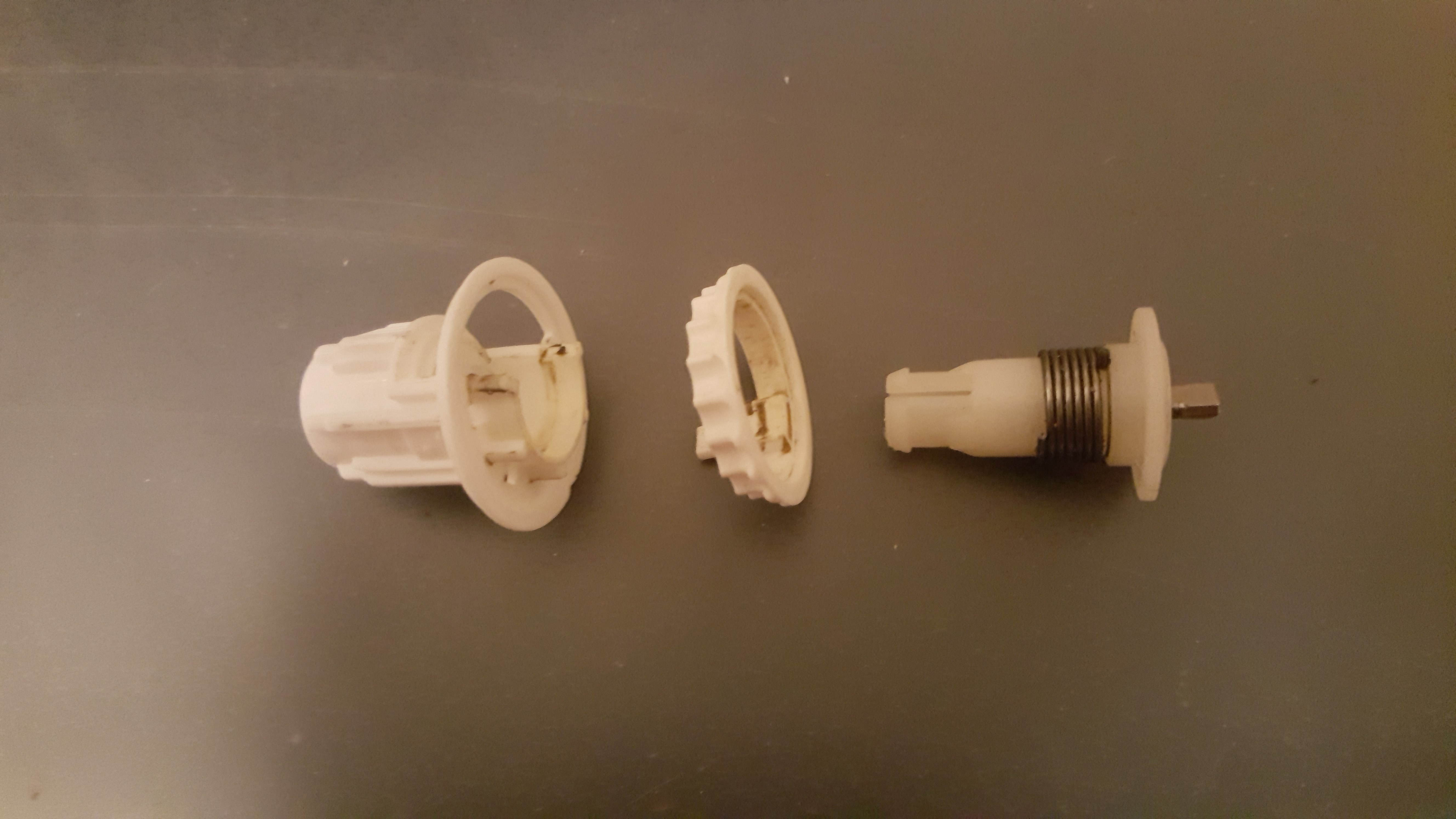 Mechanik eines Rollos mit Seilzug, geöffnet